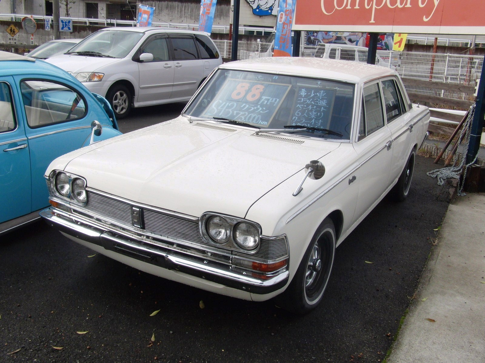 トヨペット・クラウン（S5#型）をフロントから撮影